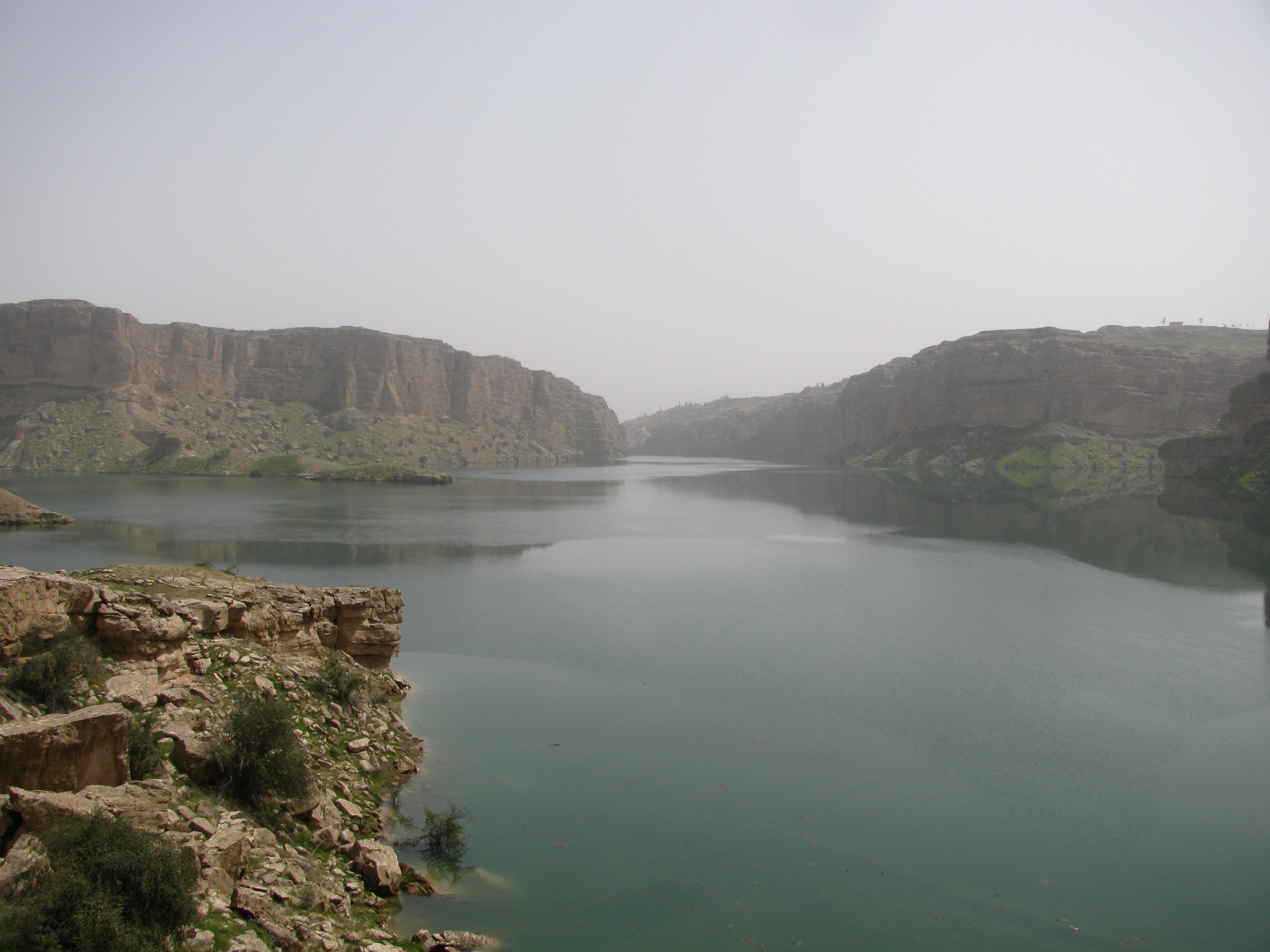 دریاچه پشت سد رییس علی دلواری